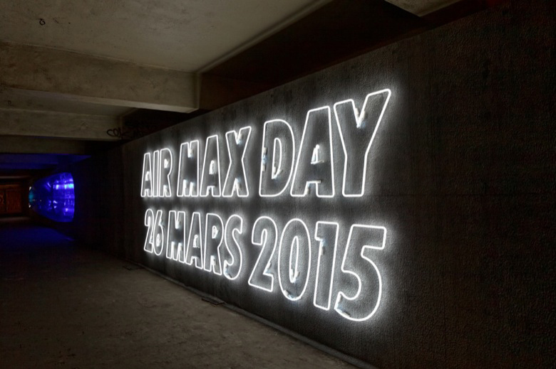 Nike Air Max Day Paris